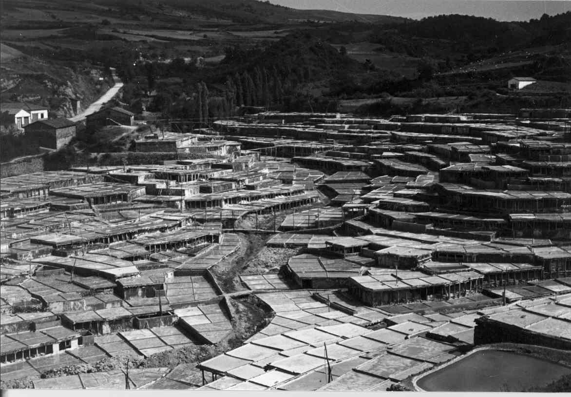 El Valle Salado de Salinas de Añana (País VAsco, España) a mediados del siglo XX.